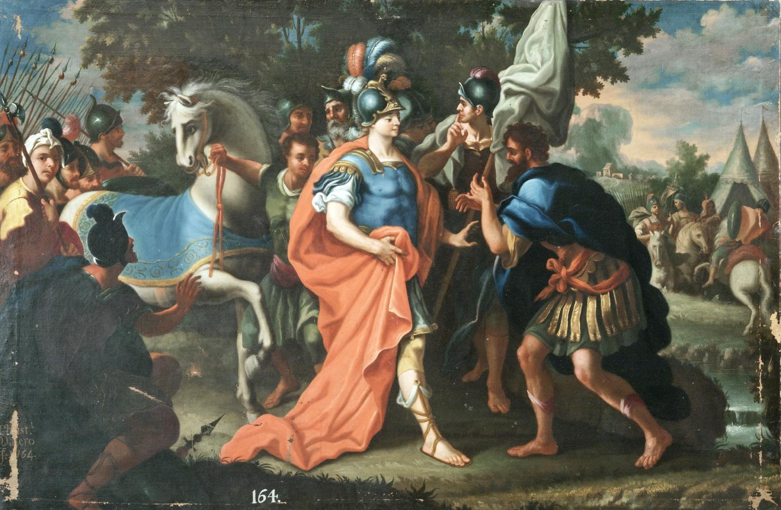 La obra representa a Telémaco, hijo del rey Odiseo, junto a Méntor.